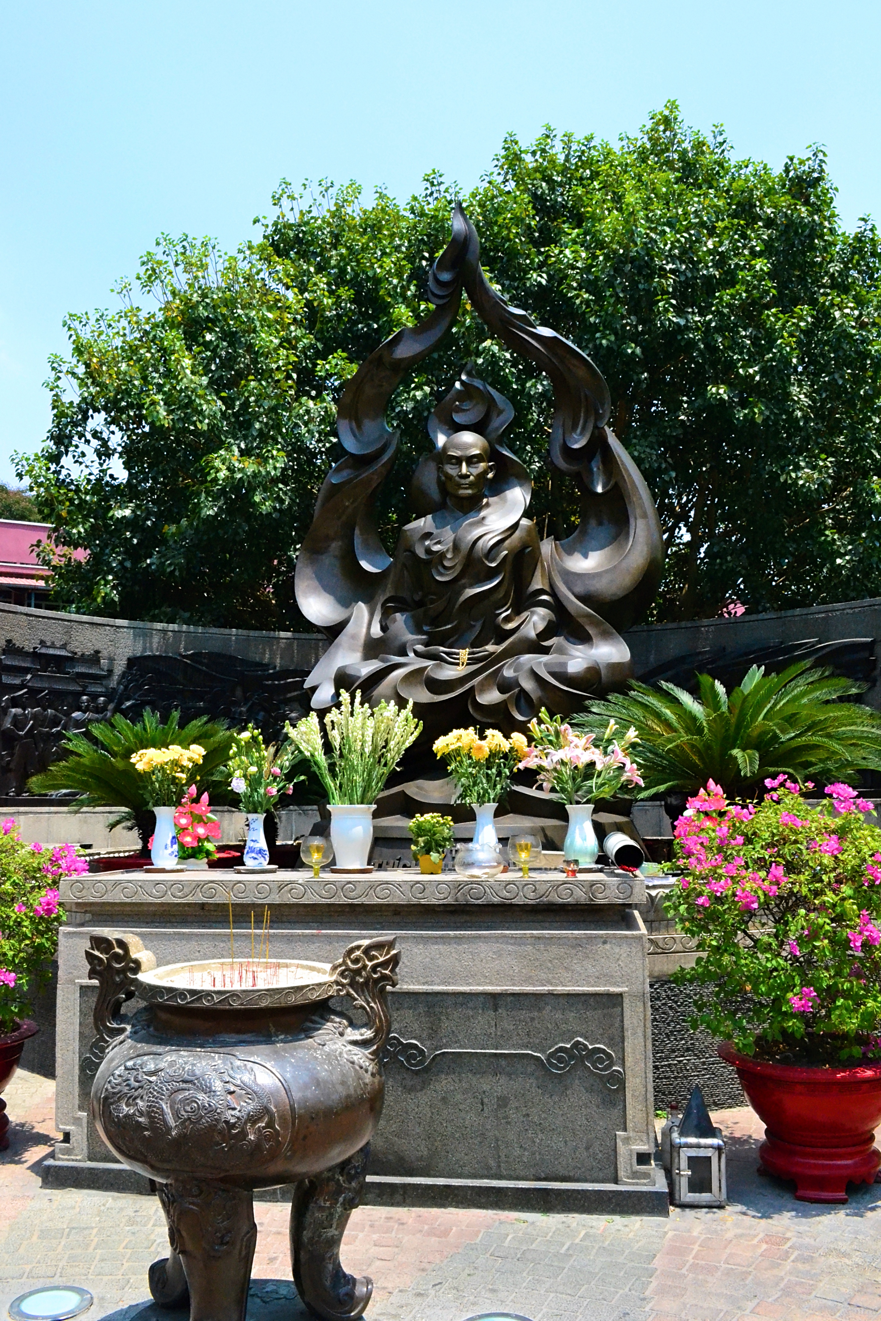 釋廣德雕像，攝於越南胡志明市